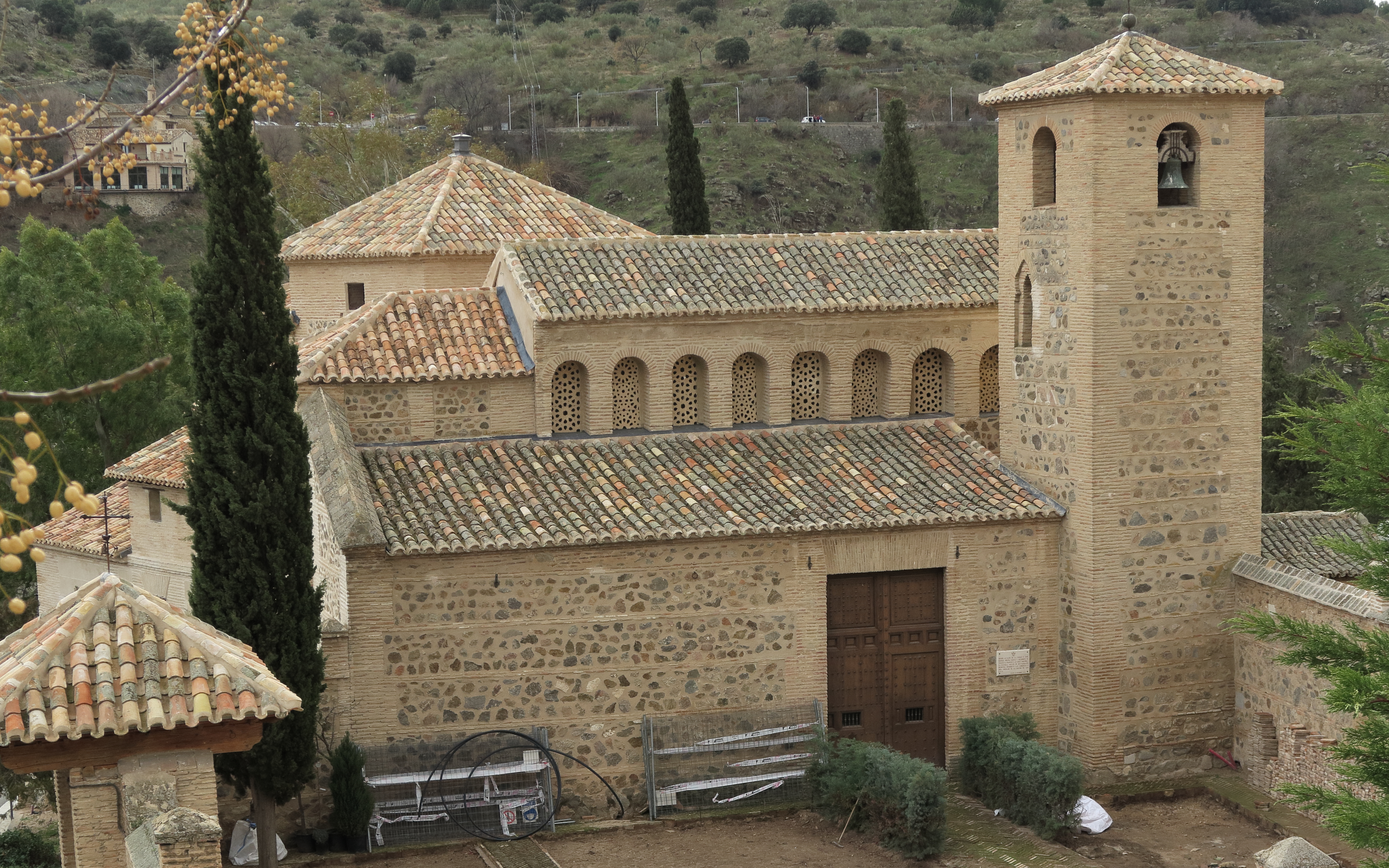 Iglesia de San Lucas, Toledo